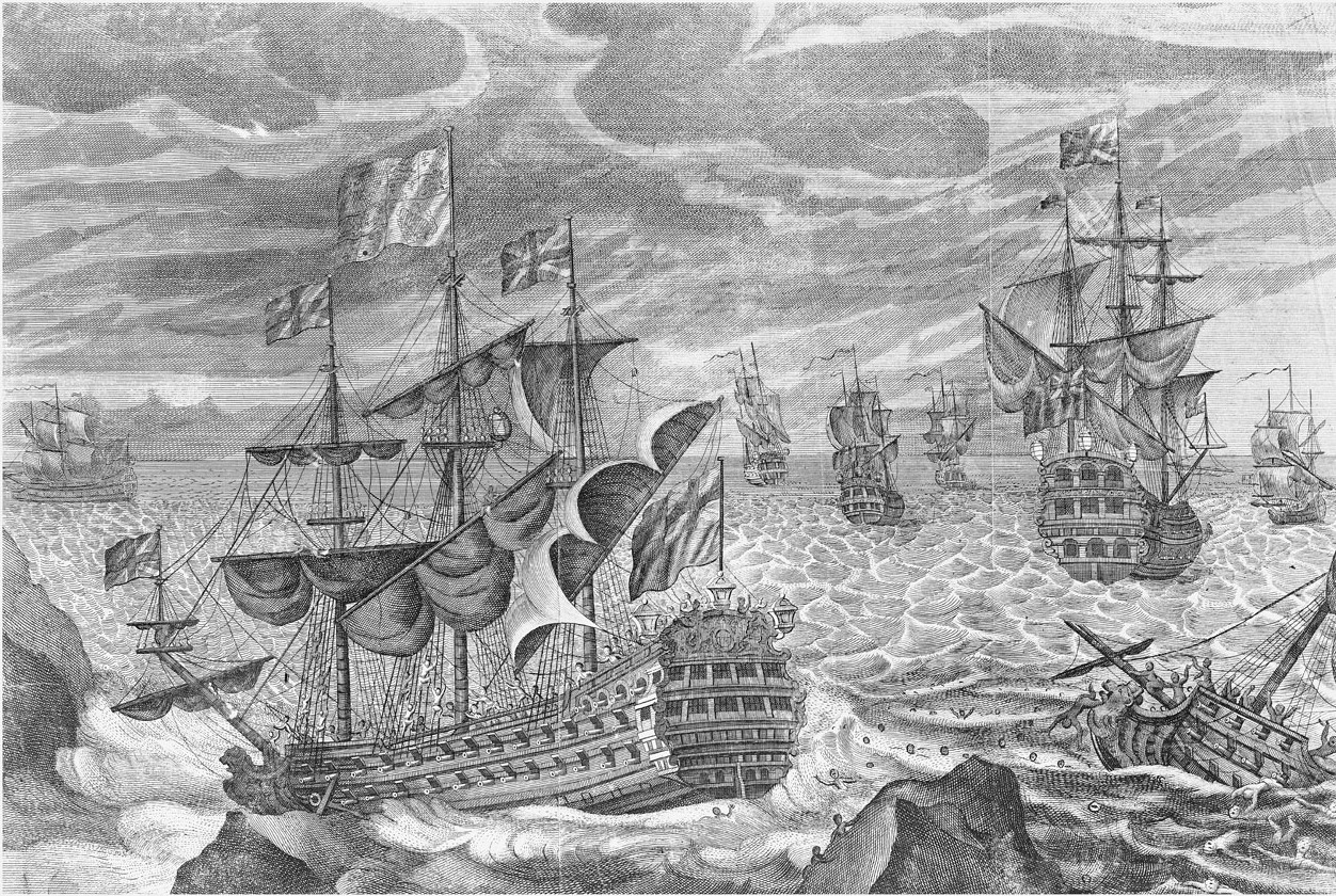 Gravure du XVIIIème siècle représentant le naufrage du HMS Association (1697), lors du Désastre naval de Sorlingues (1707)